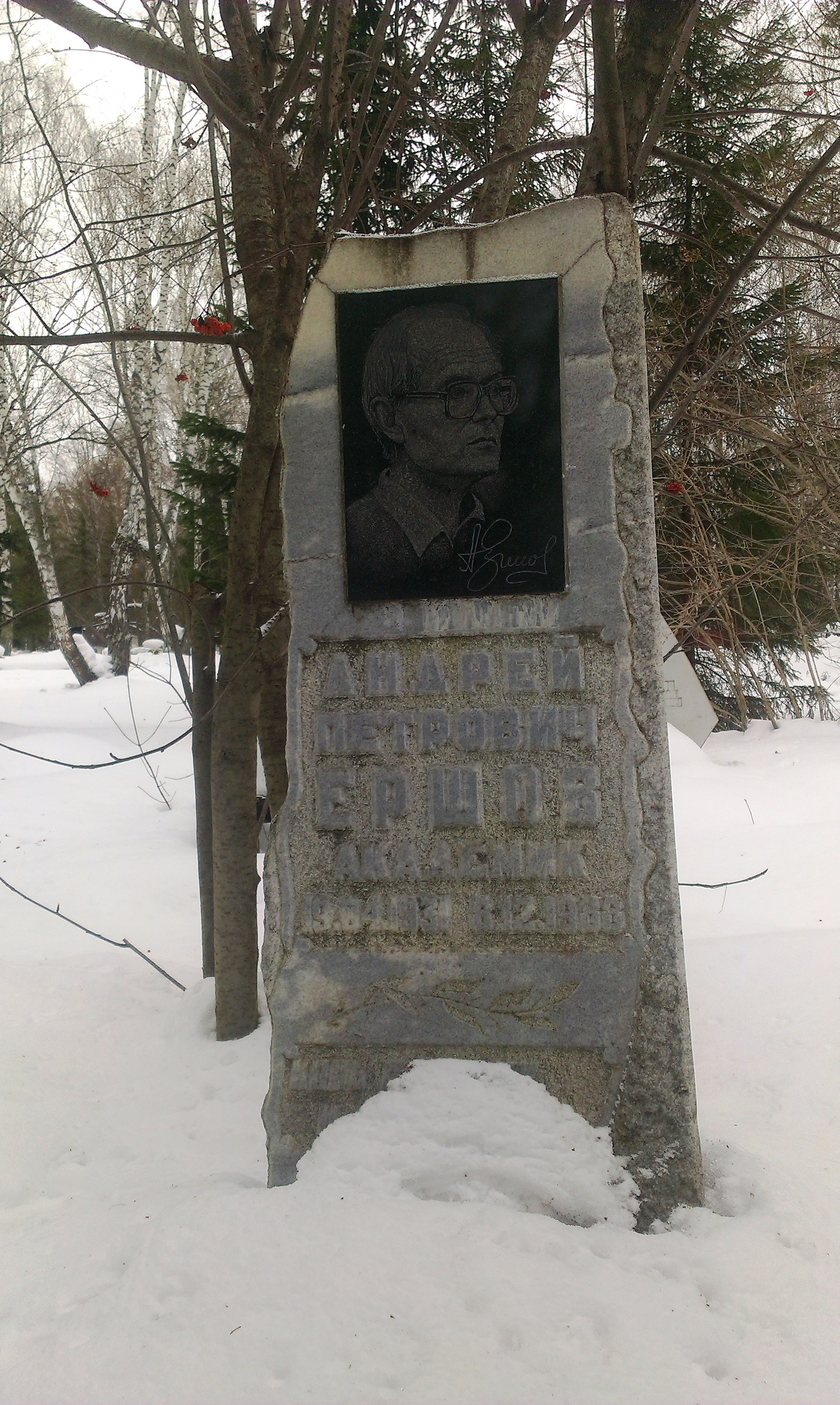 Южное кладбище в Новосибирске